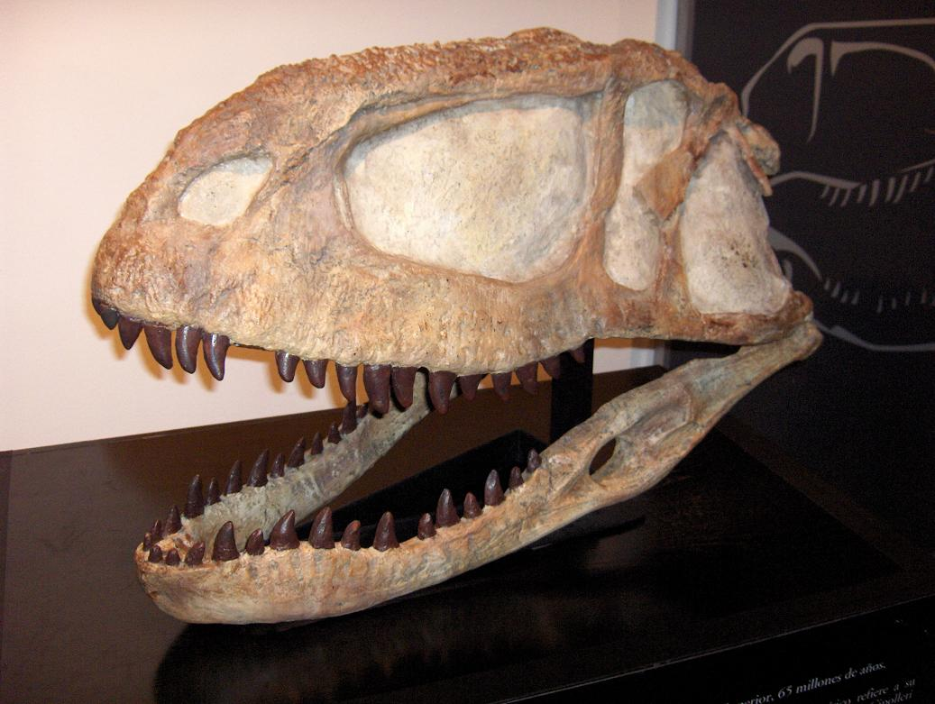 Cráneo de un Abelisaurus comahuensis. Fotografía obtenida de la exposición temporal "Dinosaurios de Patagonia", en Alicante, España (Spain).